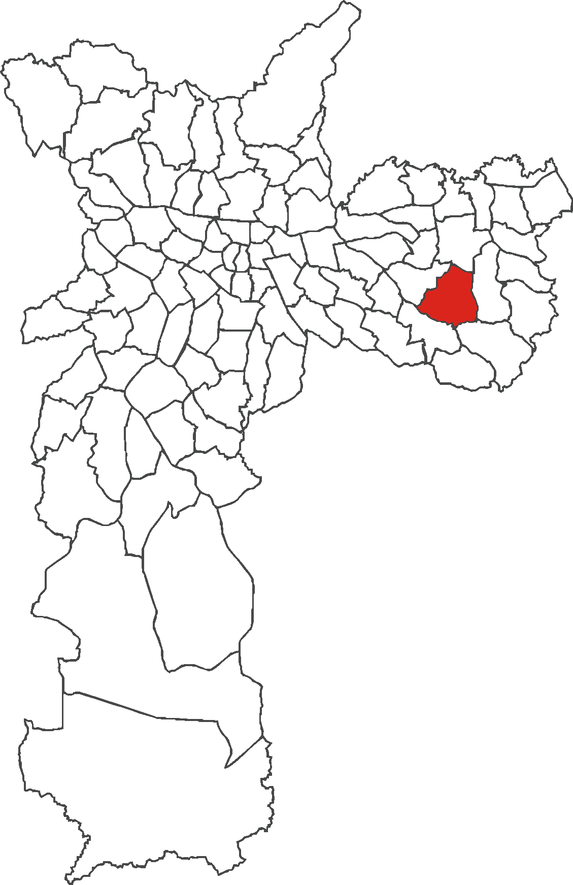 Localização do distrito do Parque do Carmo no município de São Paulo.